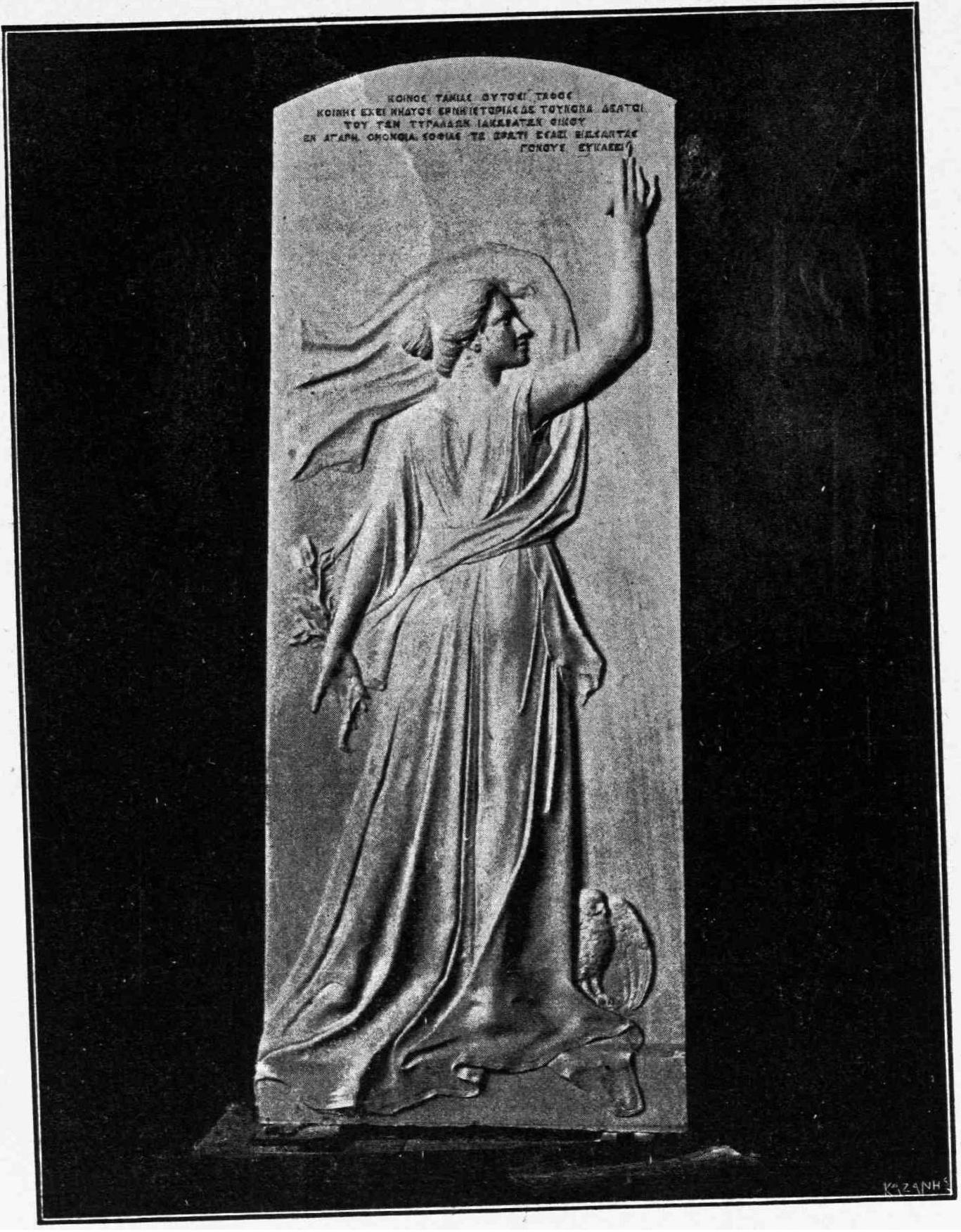 Skulptur "Geschichte"